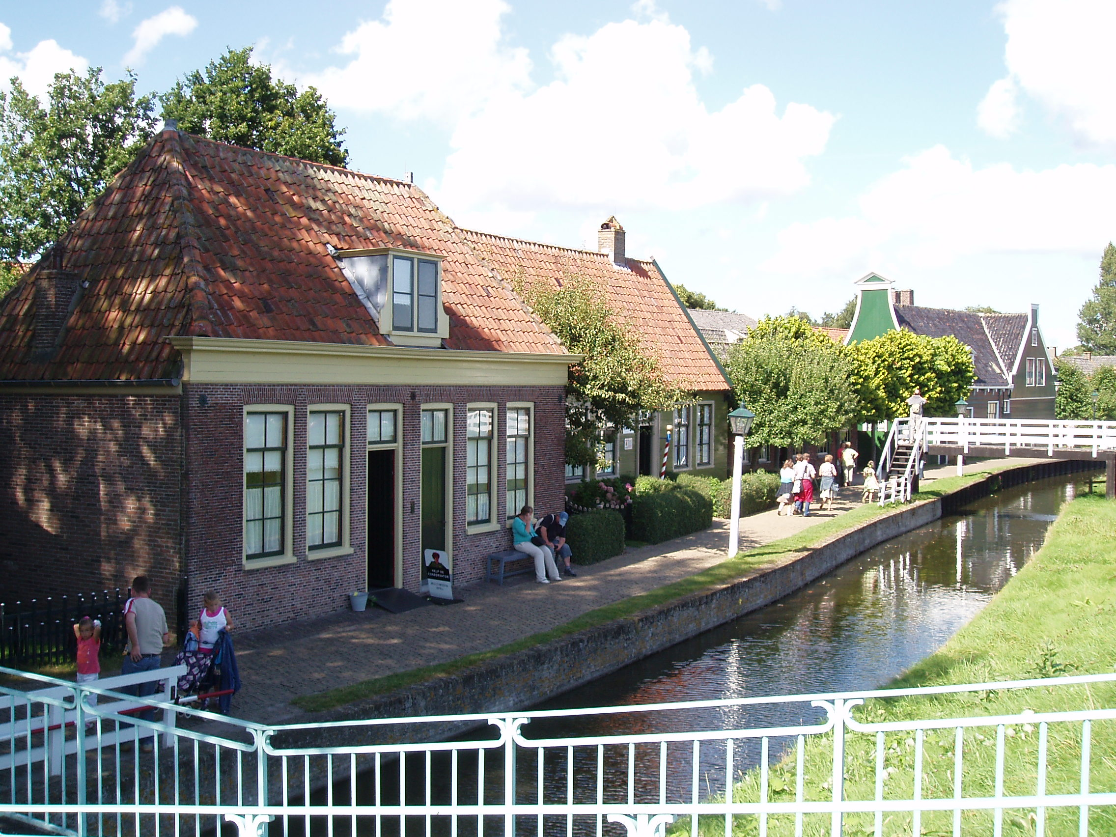 Zuiderzeemuseum in town Enkhuizen, the Netherlands